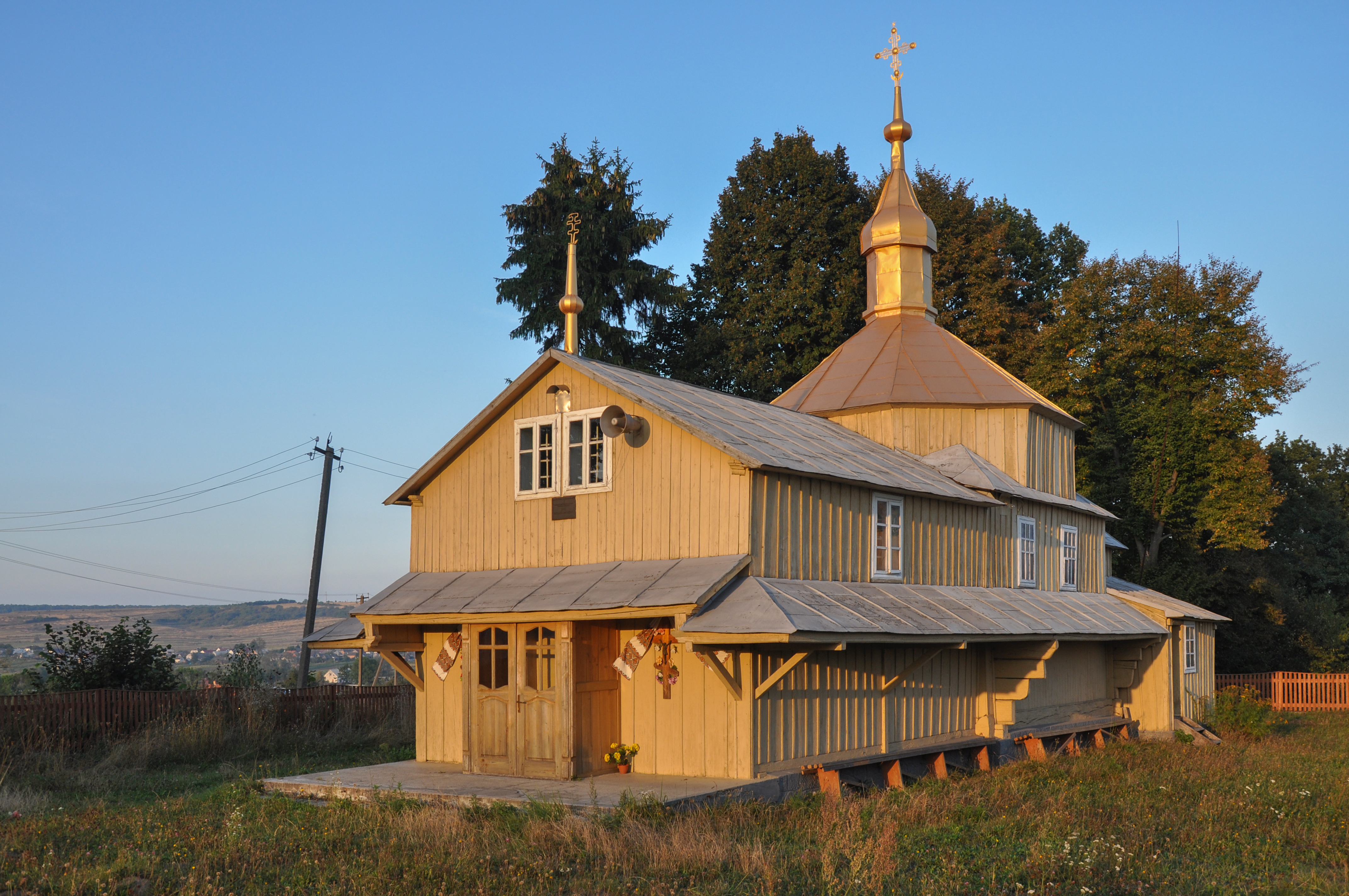 Церква Вознесіння Господнього (дер.), с.Волощина